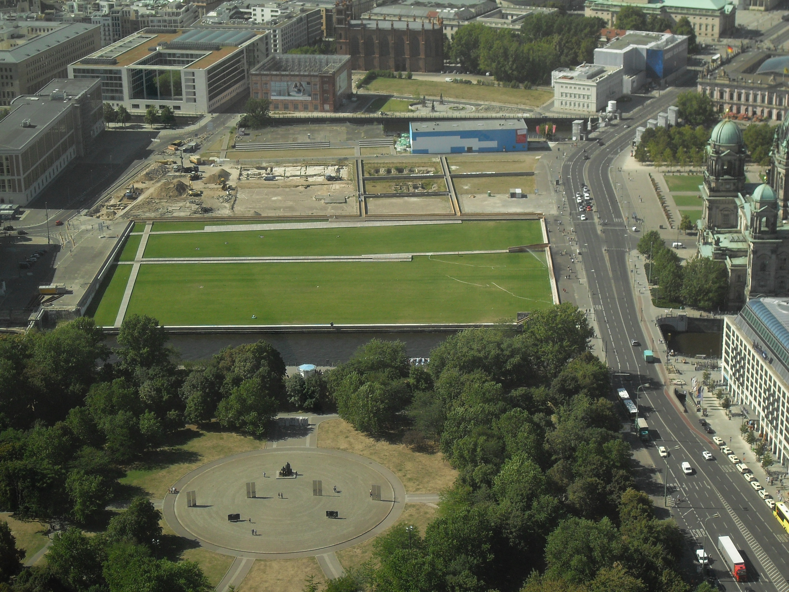 Grüne Baugrube des ehemaligen Palastes der Republik